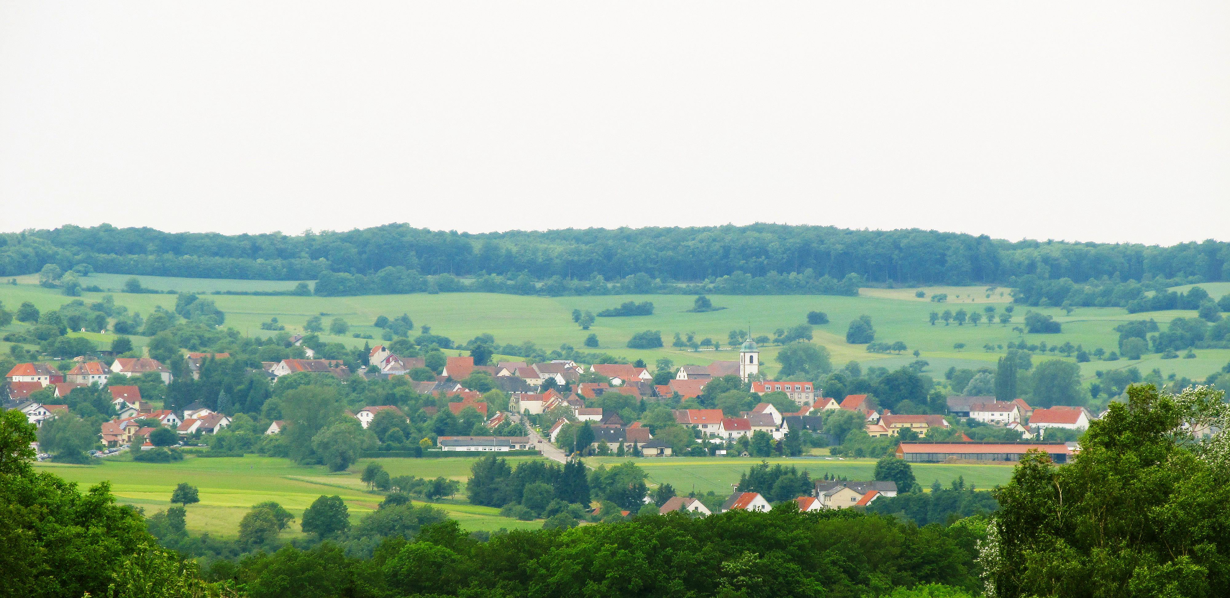 Blick auf Medelsheim, Gemeinde Gersheim, Saarpfalz-Kreis, Saarland